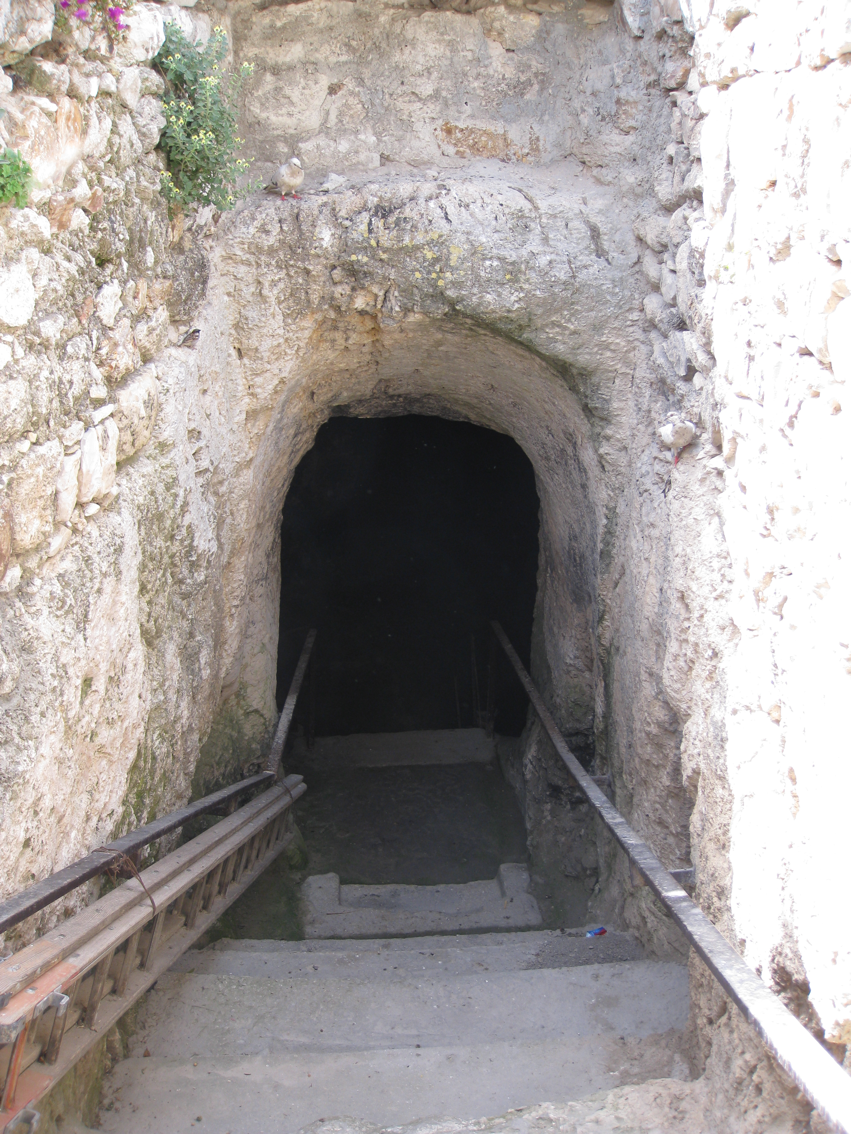 הר הזיתים Mount of Olives הכניסה לקברי חגי ומלאכי Enterance to the tomb